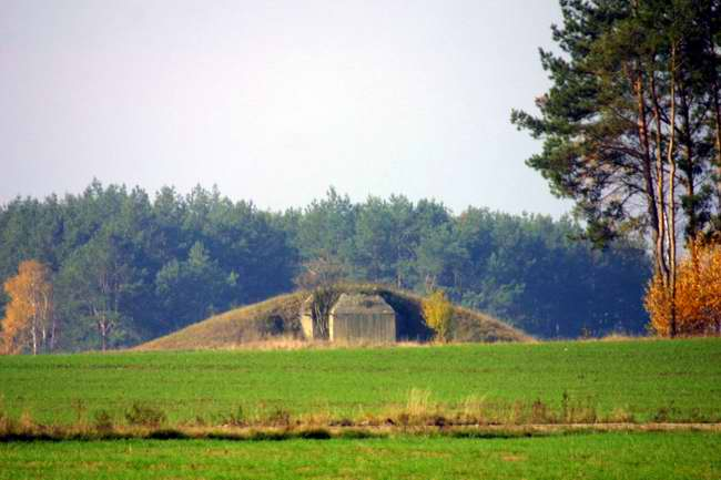 Linia Mołotowa - Bunkier w okolicach Prosienicy.